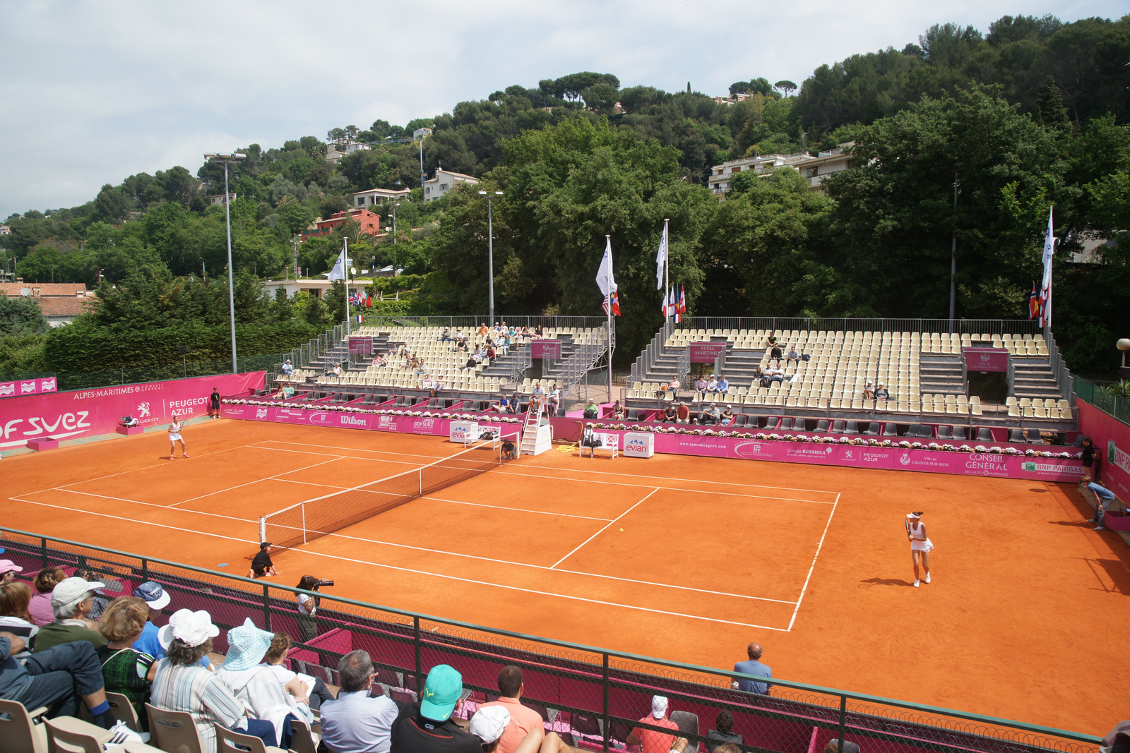 vue du court central Open Cagnes-sur-Mer